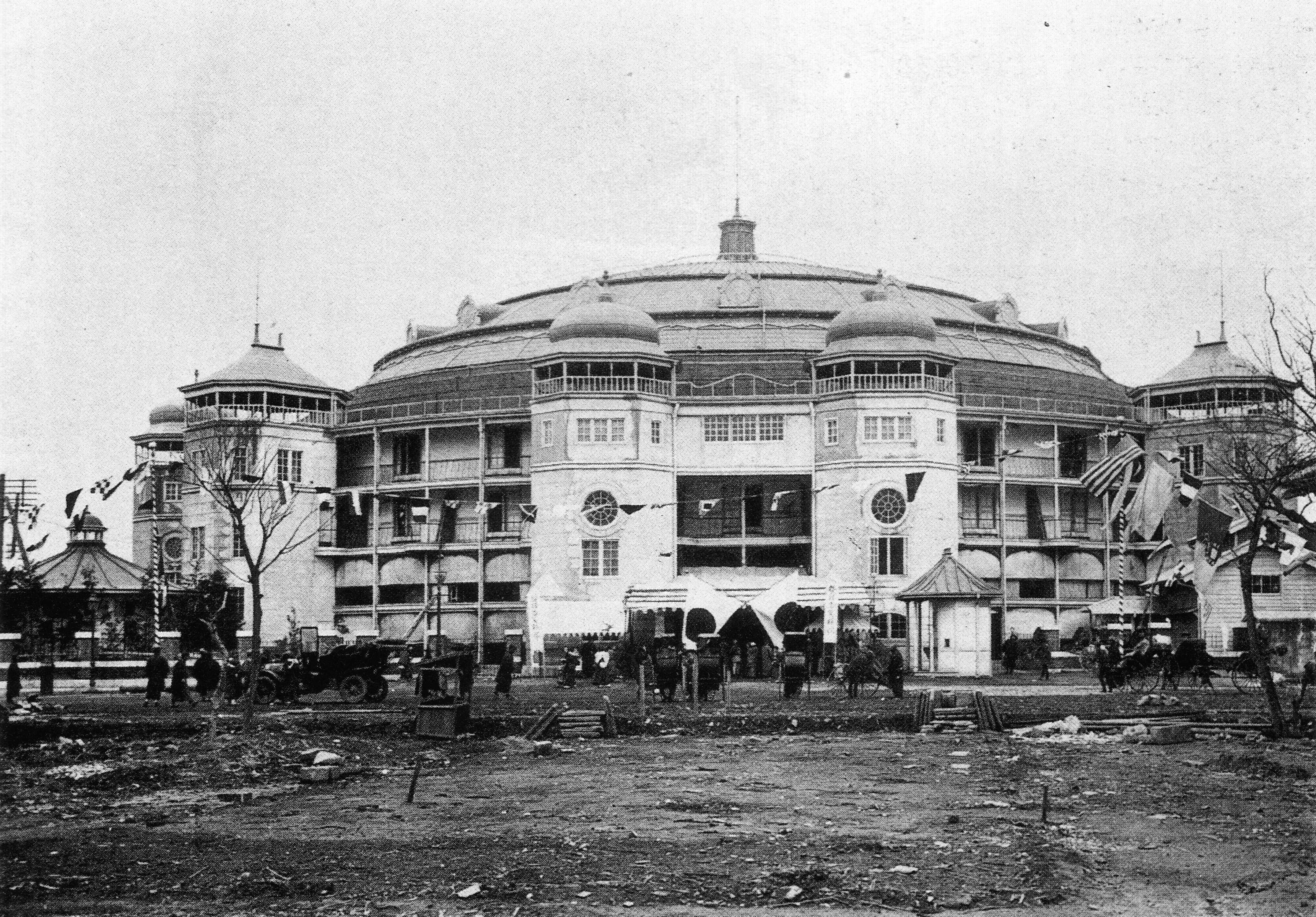 初代両国国技館